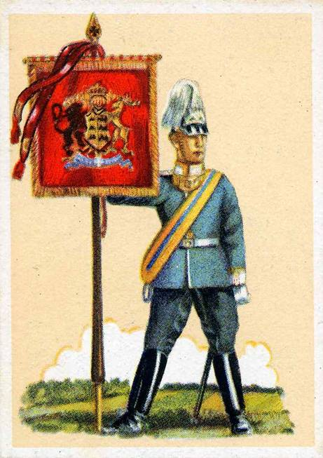 Standarte Dragoner-Regiment Königin Olga (1. Württembergisches) Nr. 25